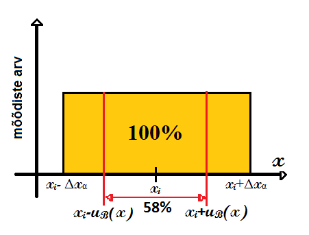 B-tüüpi mõttemääramatus ühtlase jaotuse korral